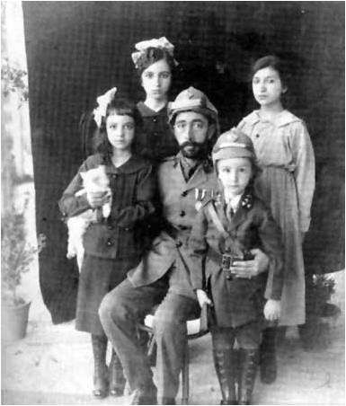 الملك فيصل الأول مع أسرته في دمشق عام 1920